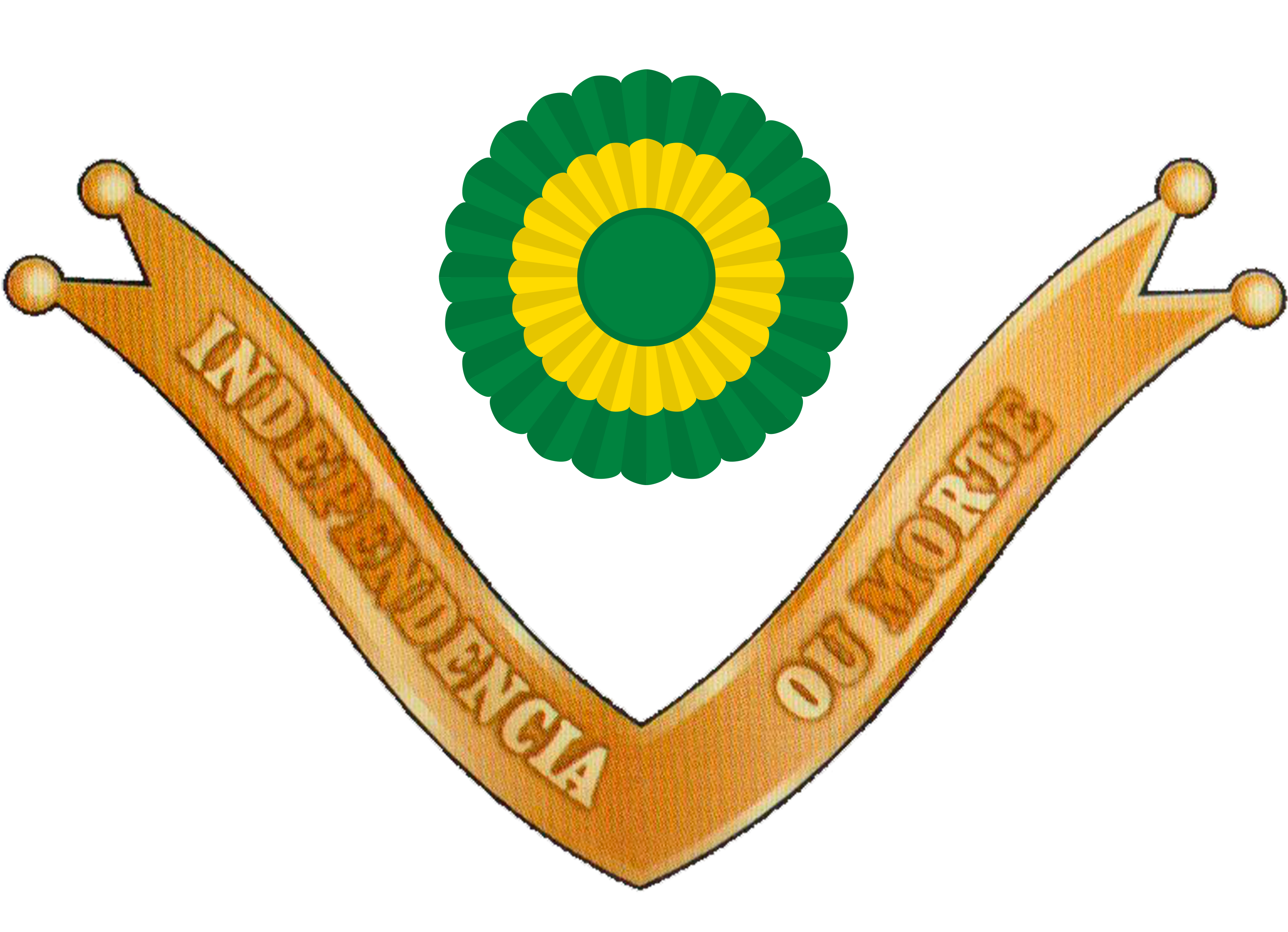 Feitura do Tope Nacional do Brasil ou Laço Nacional do Brasil nos moldes do decreto que o criou em 18 de setembro de 1822.